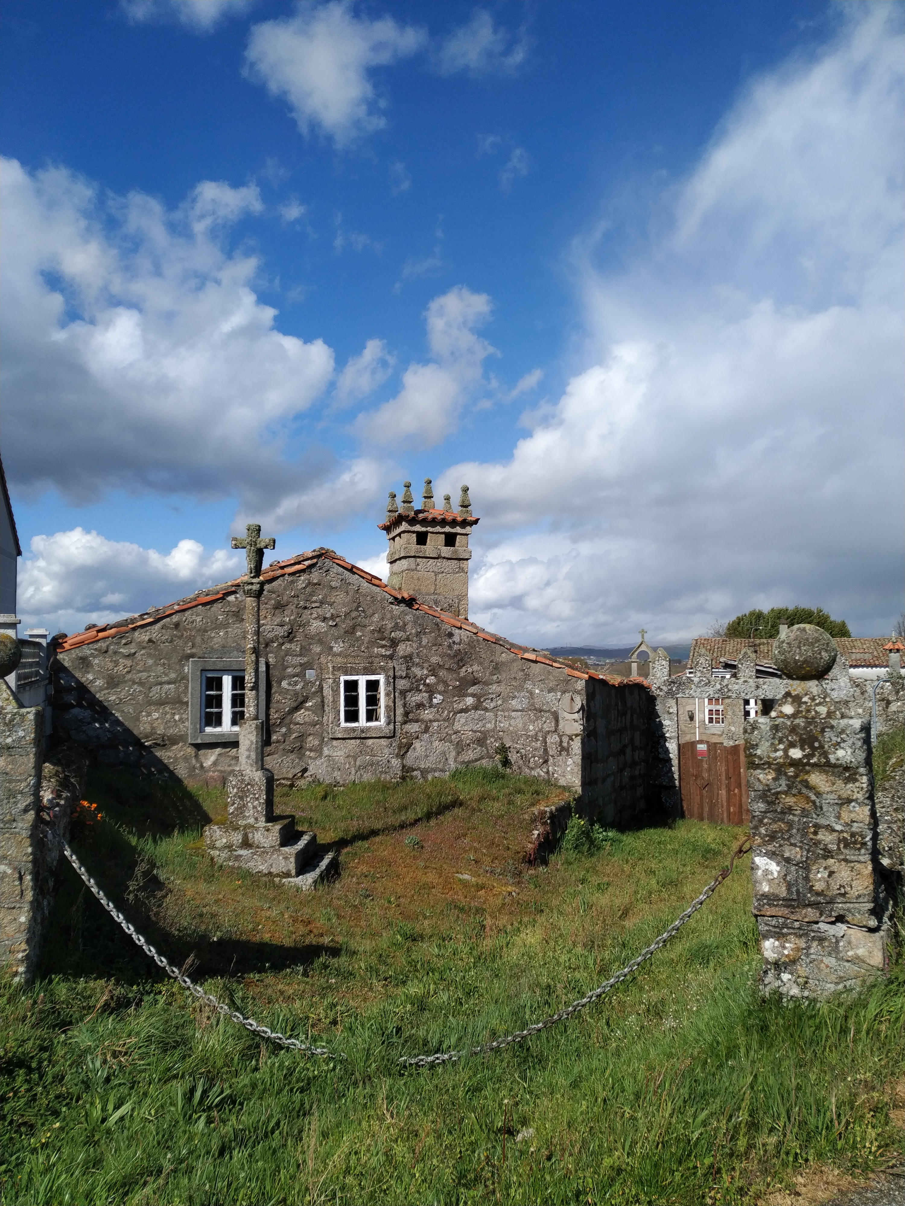 Pazo de Guntimil